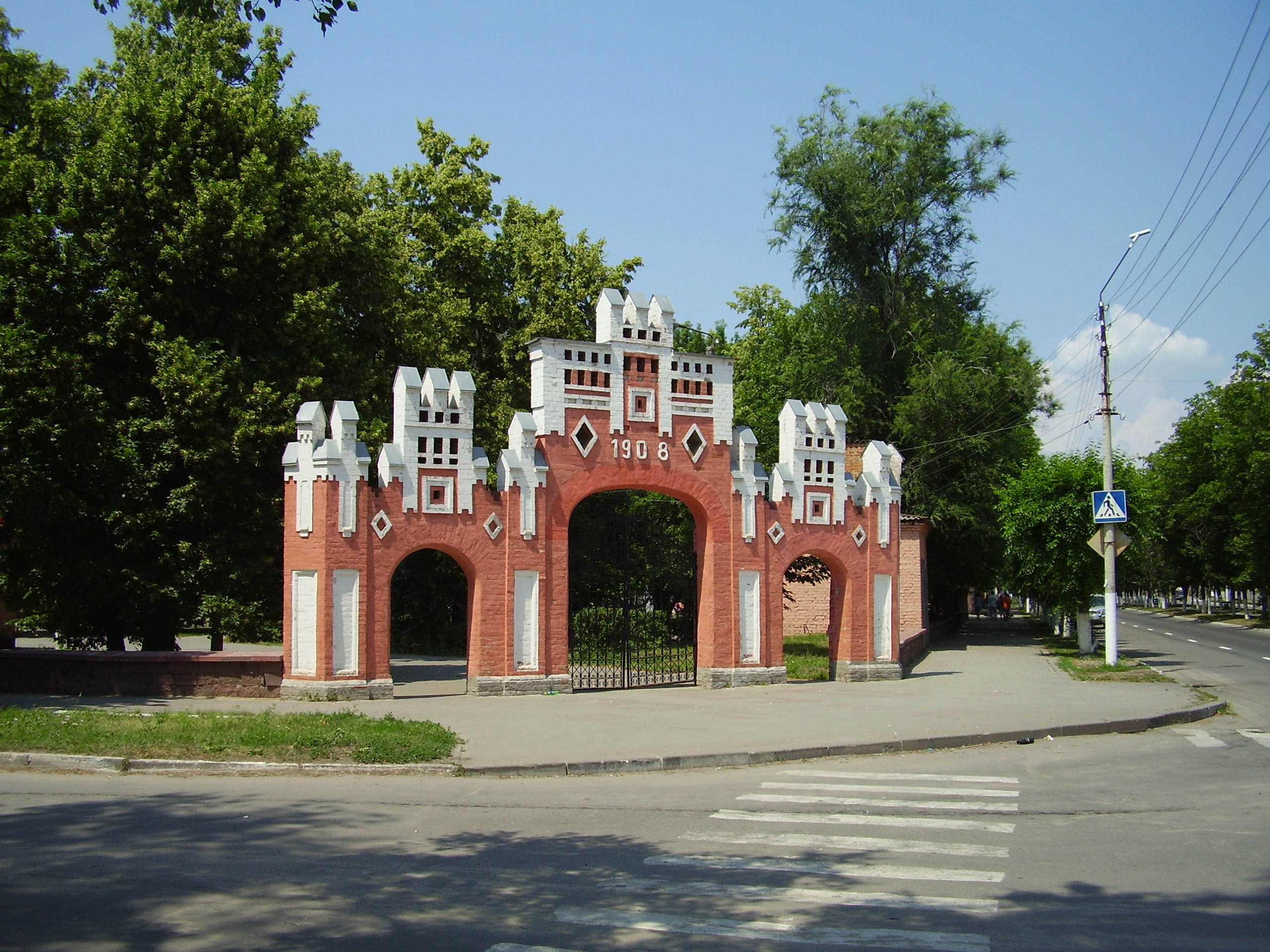 г.Острогожск. Ворота в парк культуры